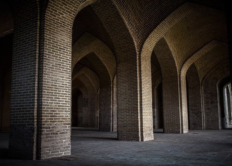 مازِرونی: فرح آباد ساری